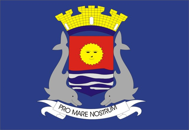 Bandeira do Município da Estância Balneária do Guarujá.